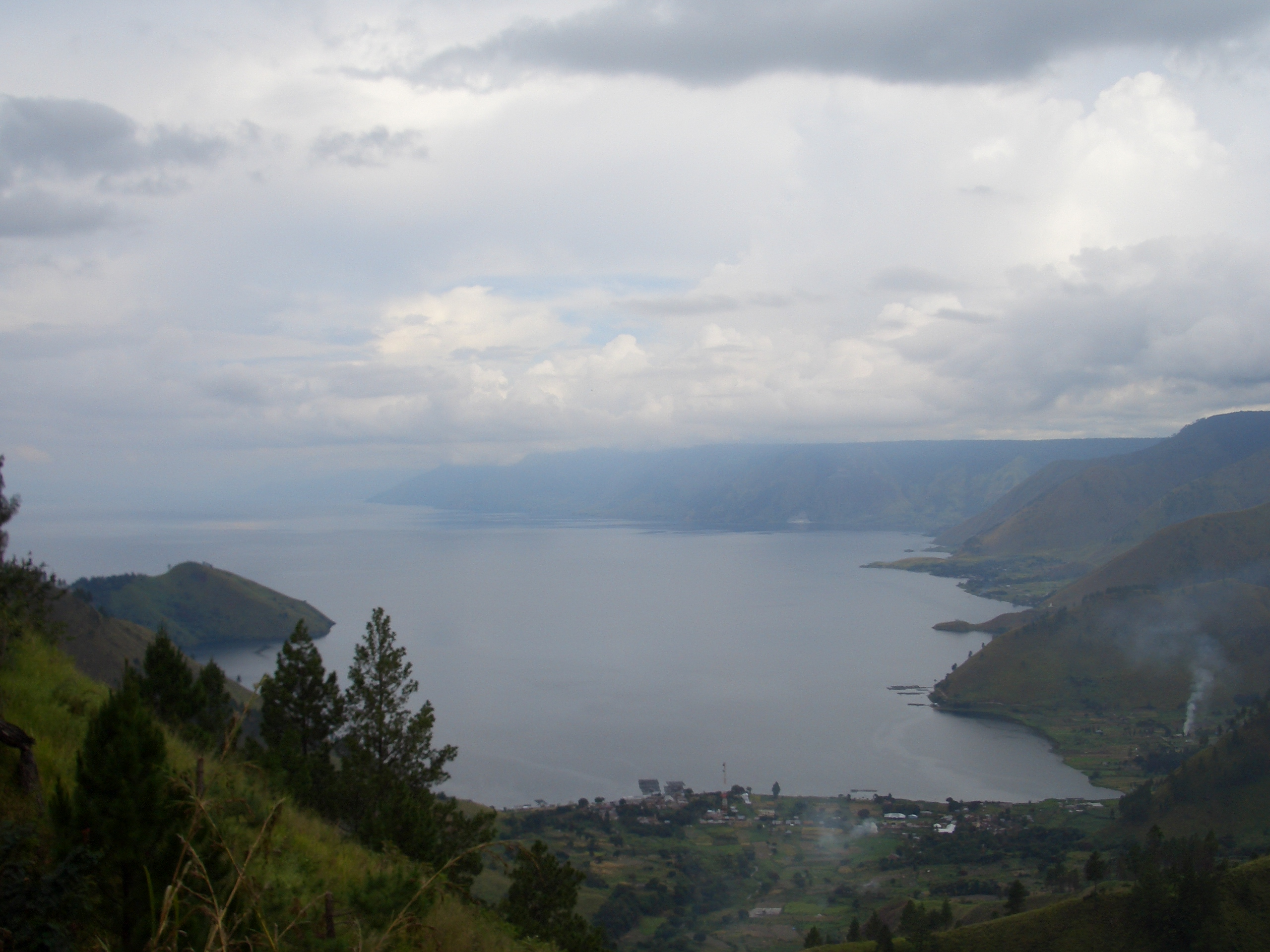 Toba Lake